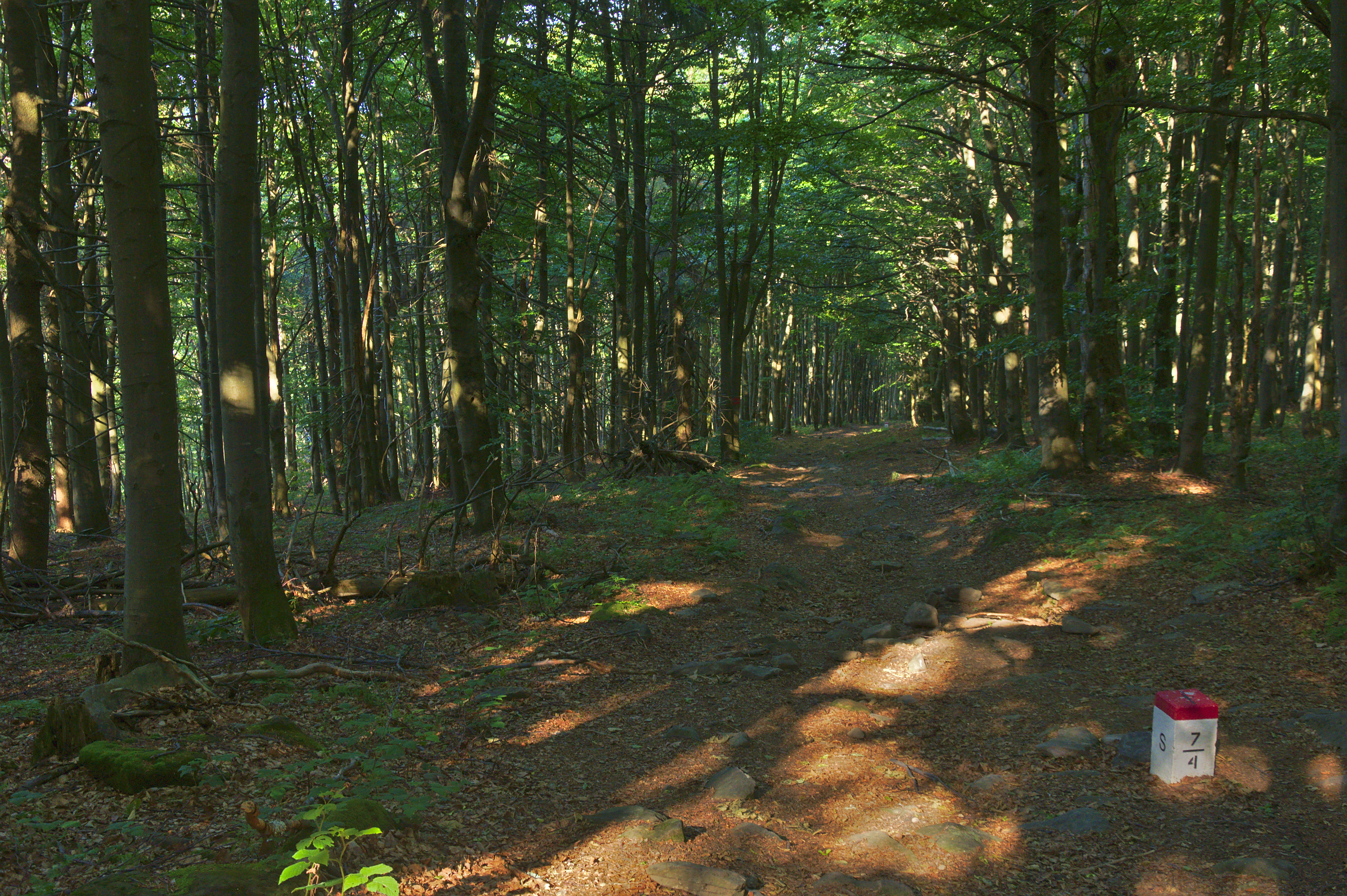 Prírodná rezervácia Borsukov vrch, Národný park Poloniny